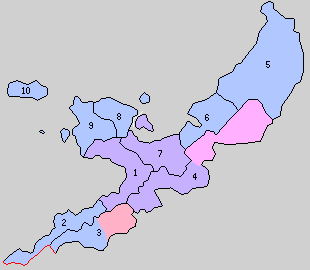 沖縄県国頭郡の町村。